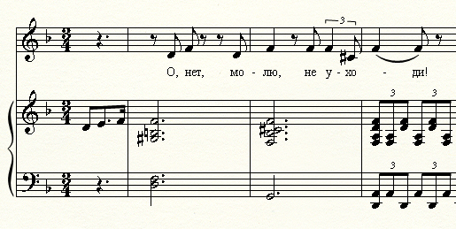 С.В. Рахманинов. Романс "О нет, молю, не уходи" (ор. 4, №1). "Рахманиновская гармония" - во втором такте.